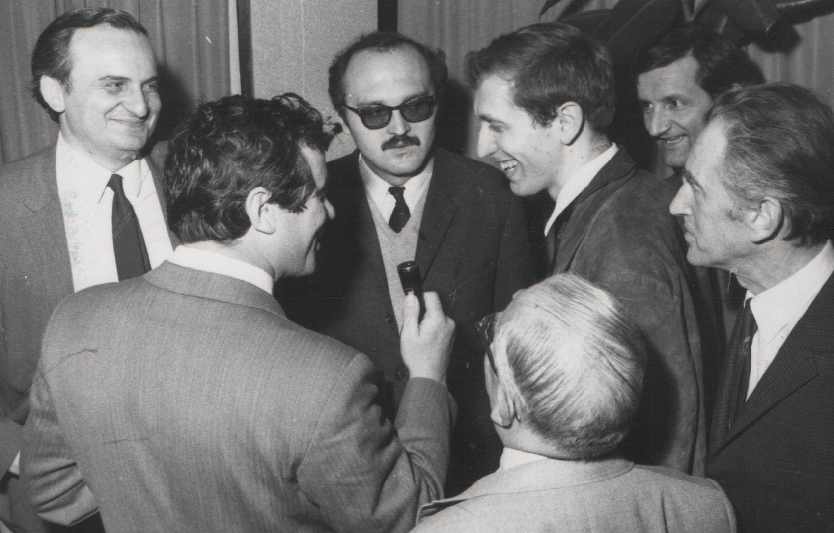 Bobi Fišer u Beogradu, 1970. foto Stevan Kragujević (po odobrenju kćerke Tanje Kragujević)